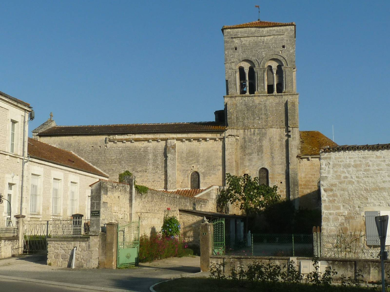 église de Vindelle (16), France